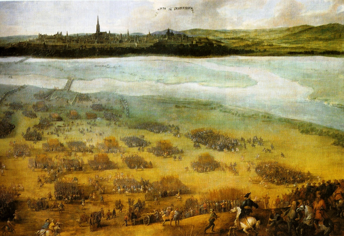 Die Belagerung Wiens im Jahre 1619 durch Heinrich Matthias von Thurn.